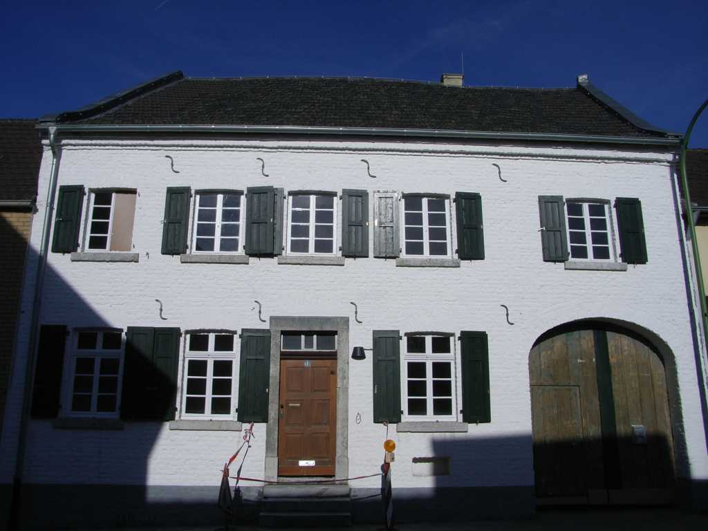 Haus des Gemeindesvorstehers (1840), ehem. Synagoge Titz-Rödingen NRW